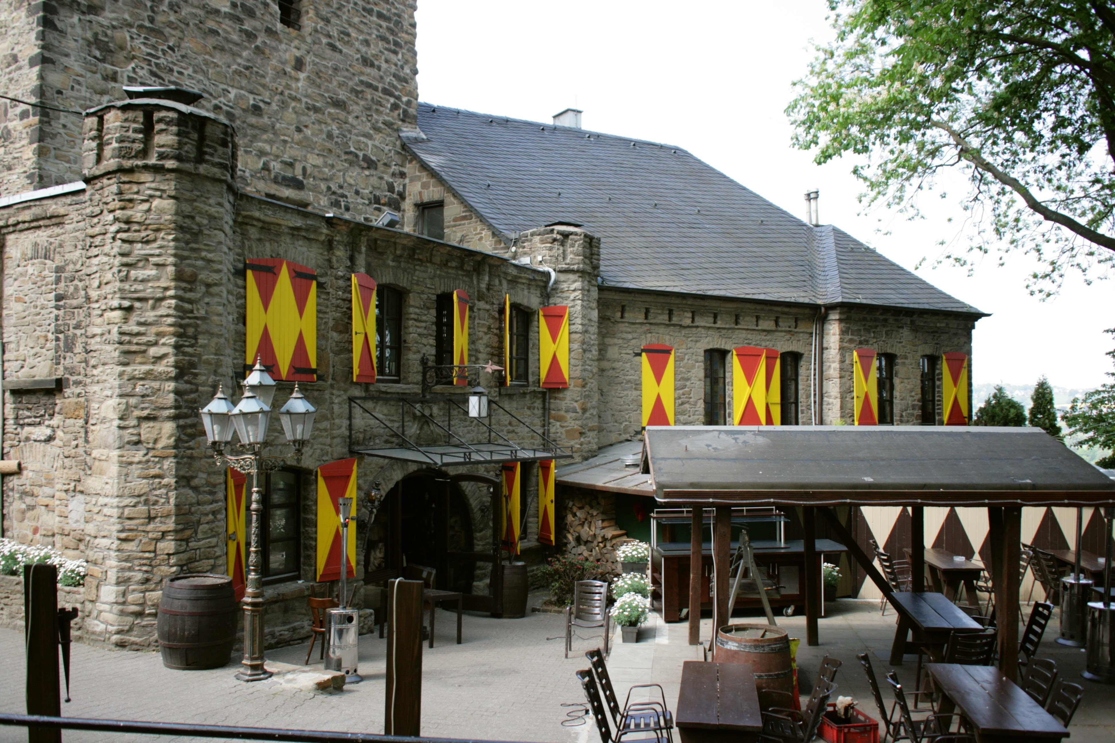 Burg Blankenstein in Hattingen-Blankenstein